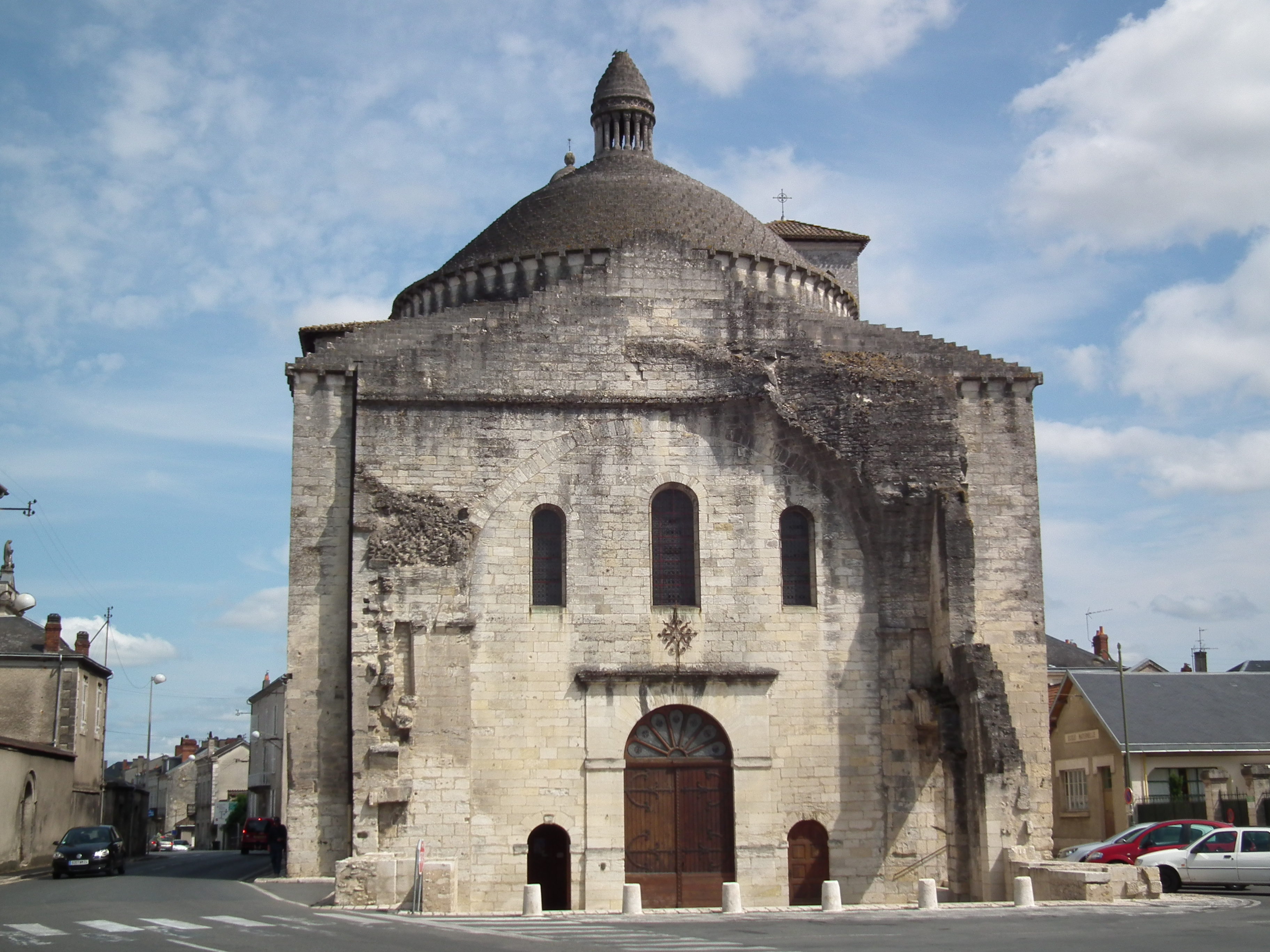 L'ancienne cathédrale Saint-Etienne de la Cité de Périgueux